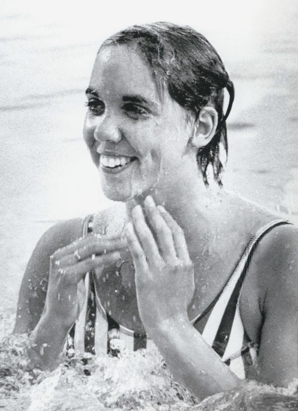 1972 PRESS PHOTO JENNIFER KEMP SETTING NEW RECORD IN 100-METER FREESTYLE 58.63